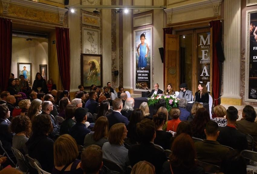 2019年12月にスペイン・バルセロナのMEAMヨーロッパ近代美術館で催されたARC授与式。